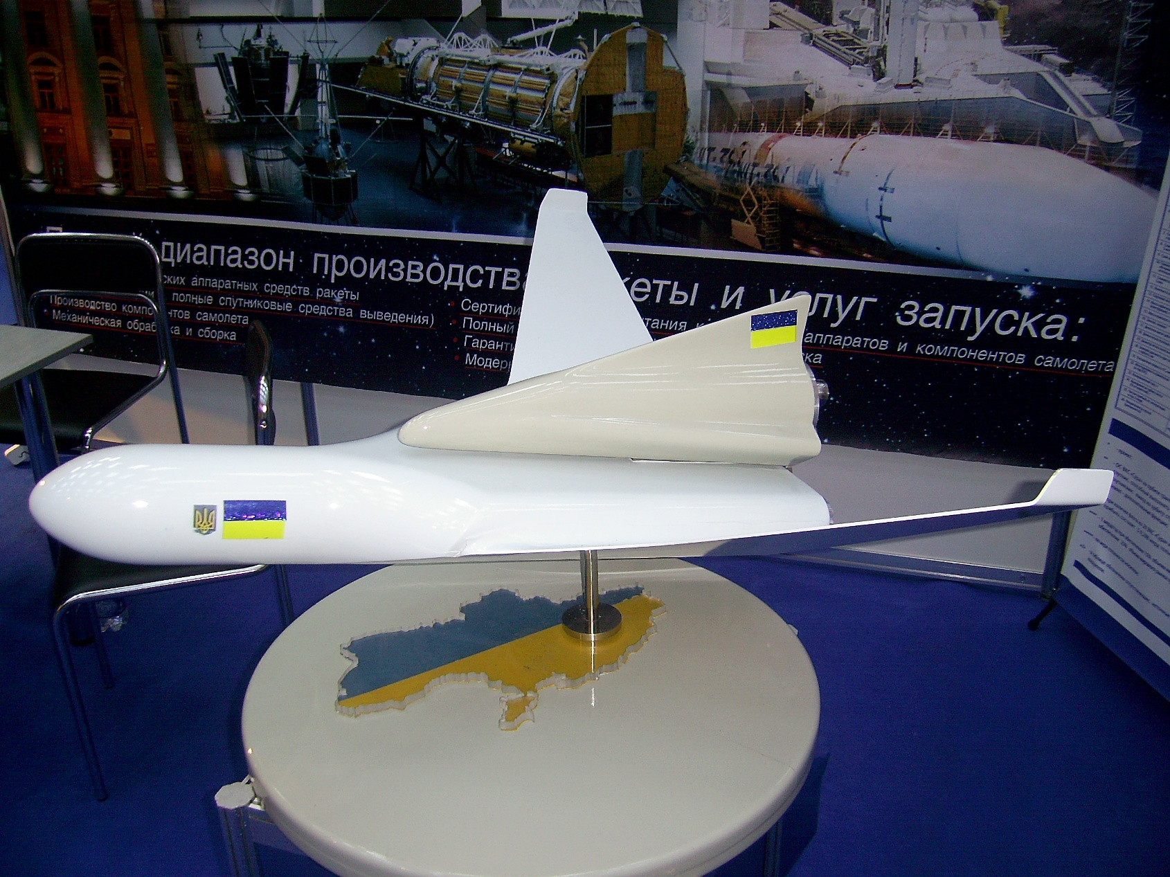 Сура (воздушно-космический самолёт)